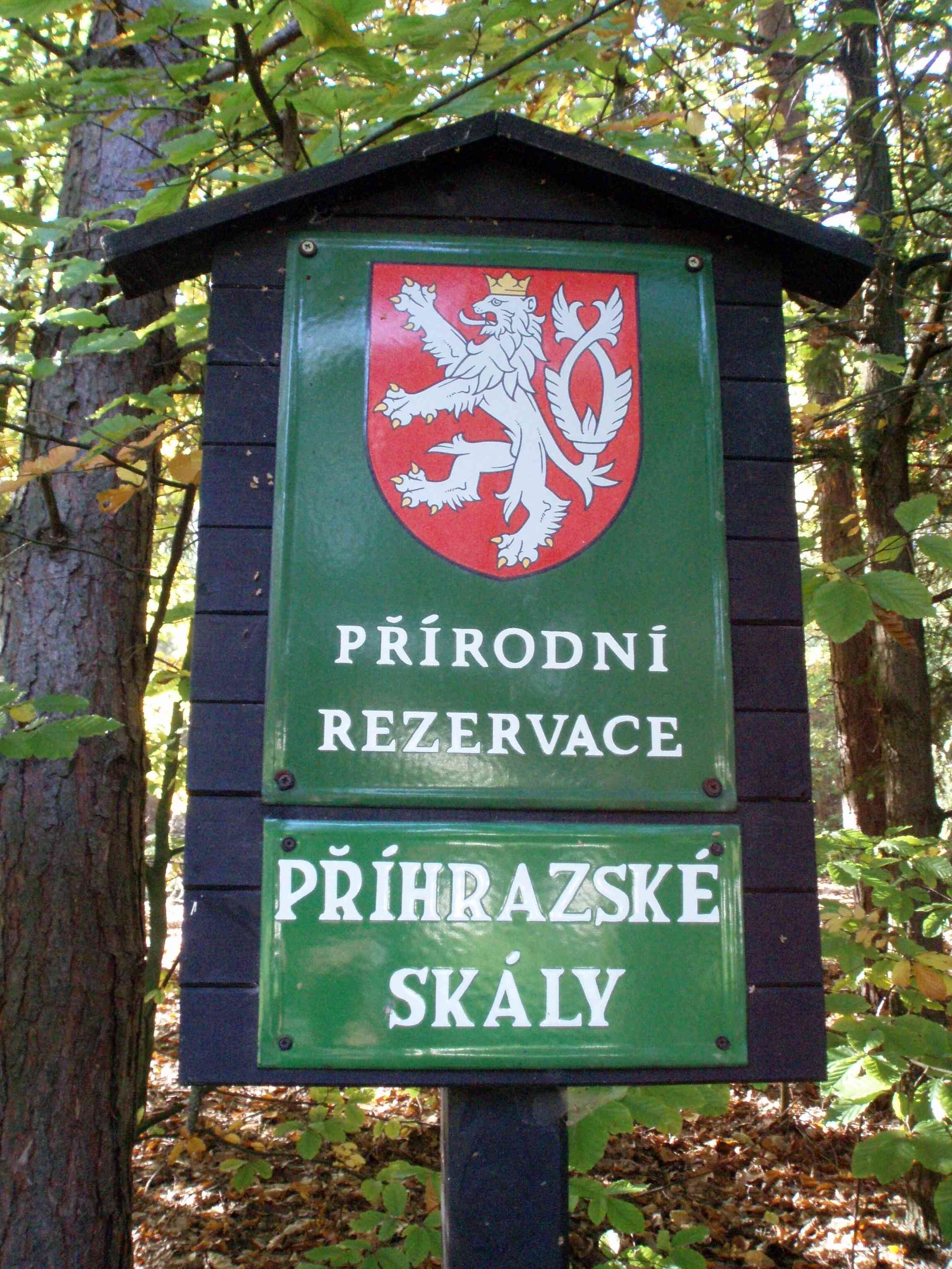 Naturschutzgebiet Prihrazske Skaly